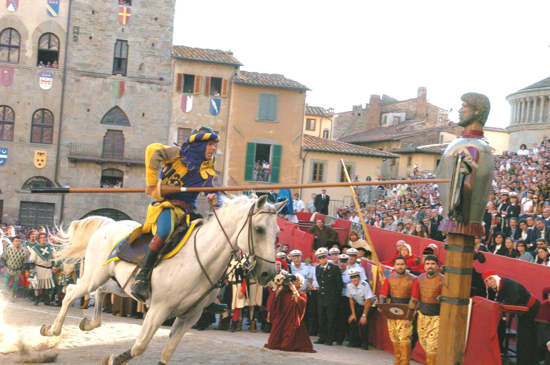 Carriera del Cavaliere di Porta S. Spirito, Giostra del Saracino, Arezzo, Italy